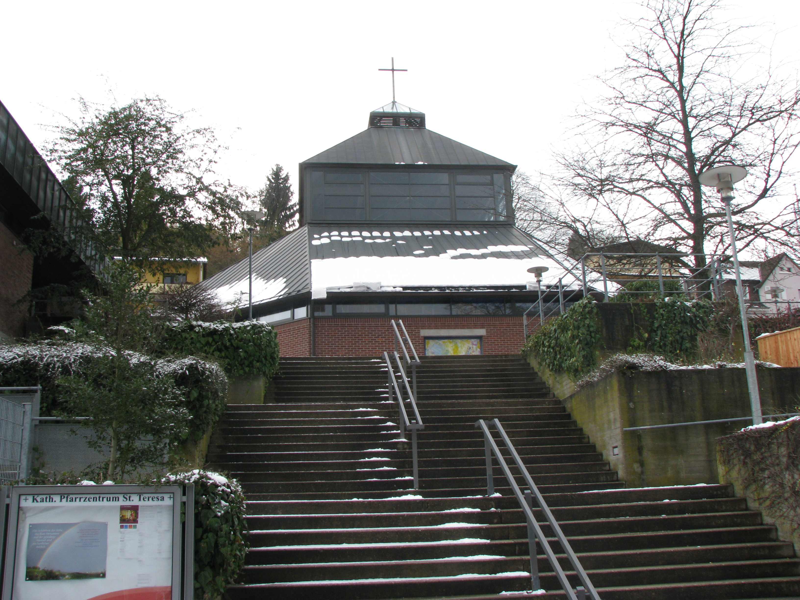 Kath. Kirche St. Teresa in Heidelberg-Ziegelhausen, erbaut 1995-97, Architekt: Werner Wolf-Holzäpfel